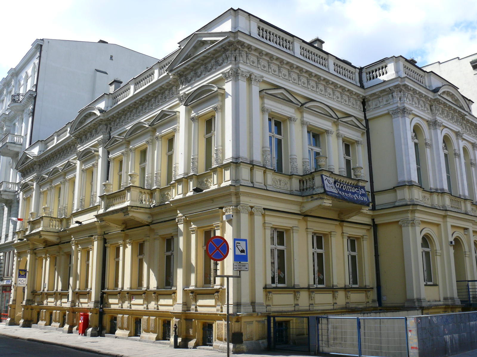 Ulica Moniuszki 4 w Łodzi